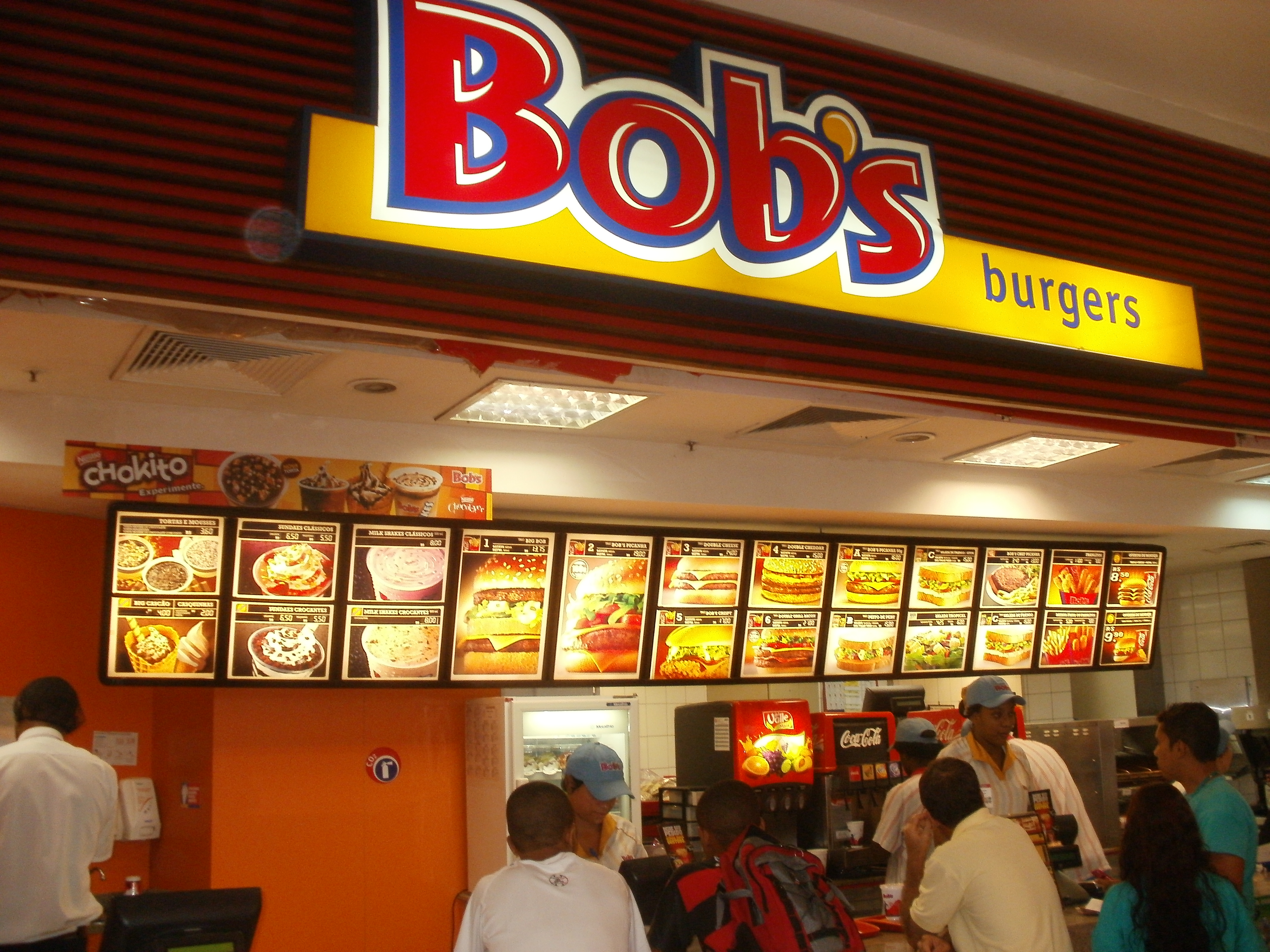 Bob's, no Caxias Shopping, Duque de Caxias, estado do Rio de Janeiro, Brasil.